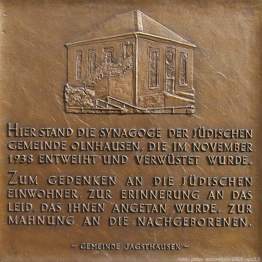 Gedenktafel am einstigen Standort der Synagoge (heute Feuerwehrhaus) von Jagsthausen-Olnhausen